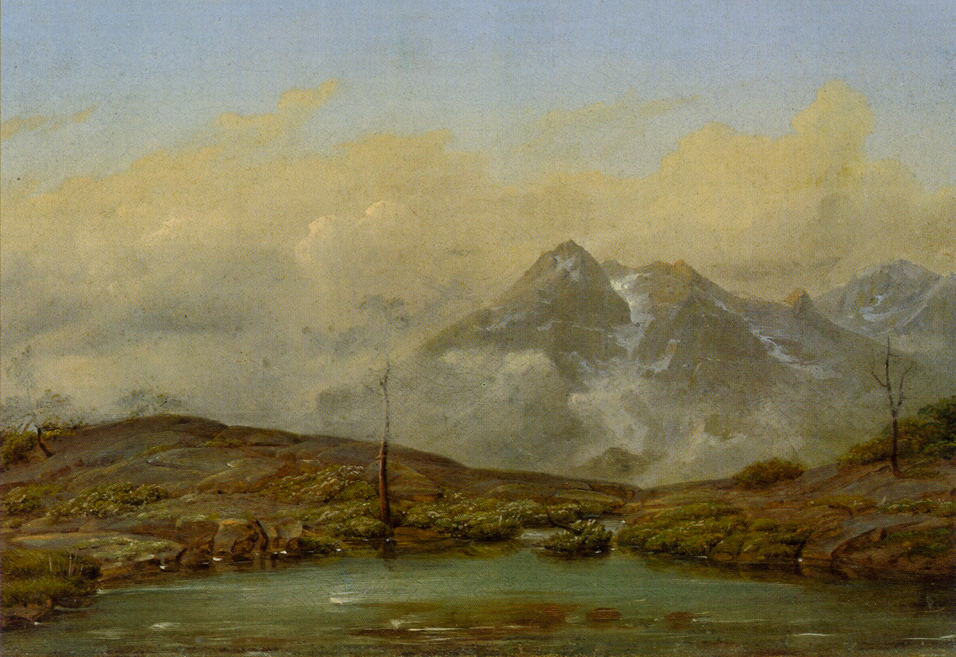 Август Матиас Хаген. Туман у высоких гор. 1820 г.